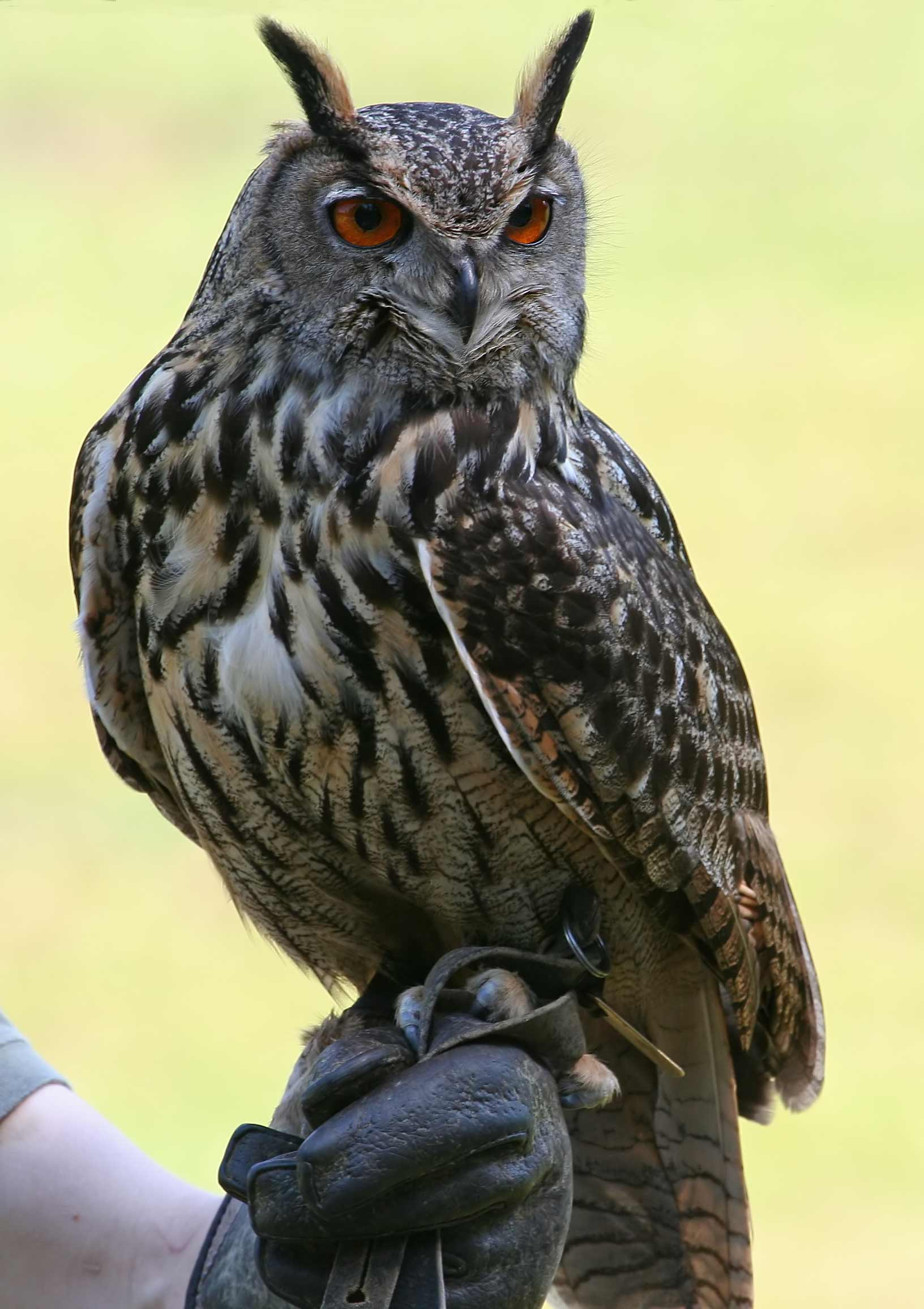 Uhu (Bubo bubo) im Wildpark Eekholt